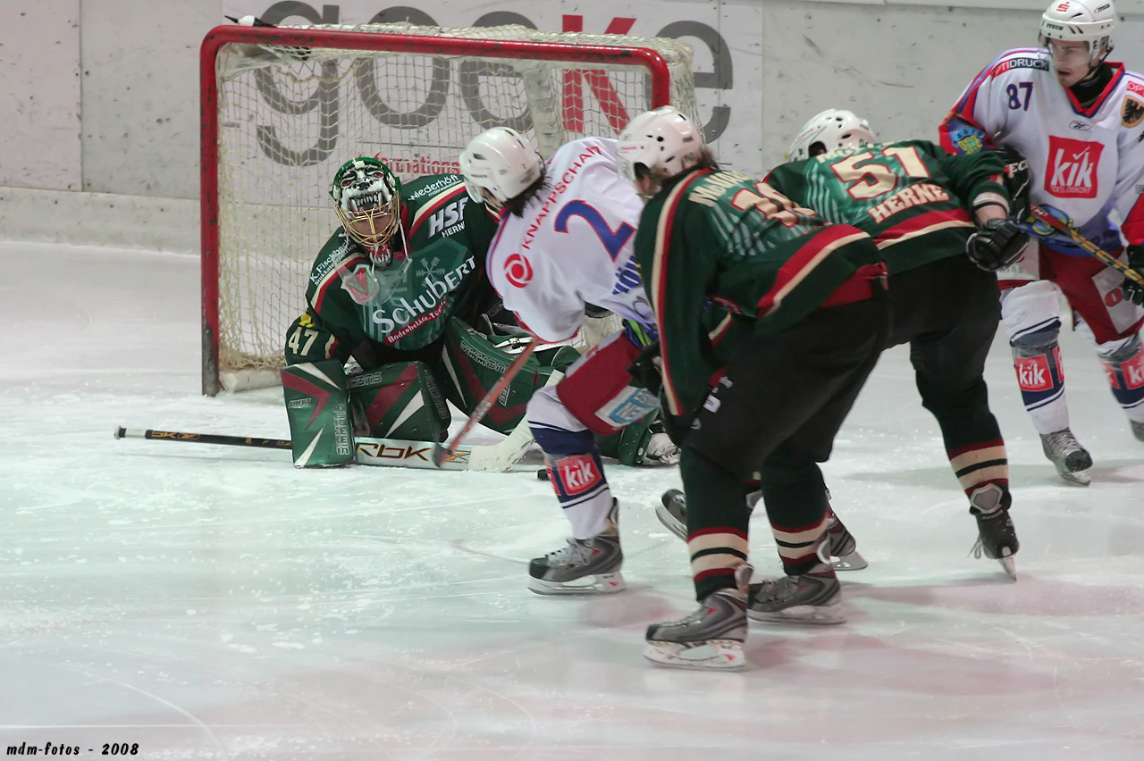 Spielszene des Finalspiels zwischen EHC und HEV